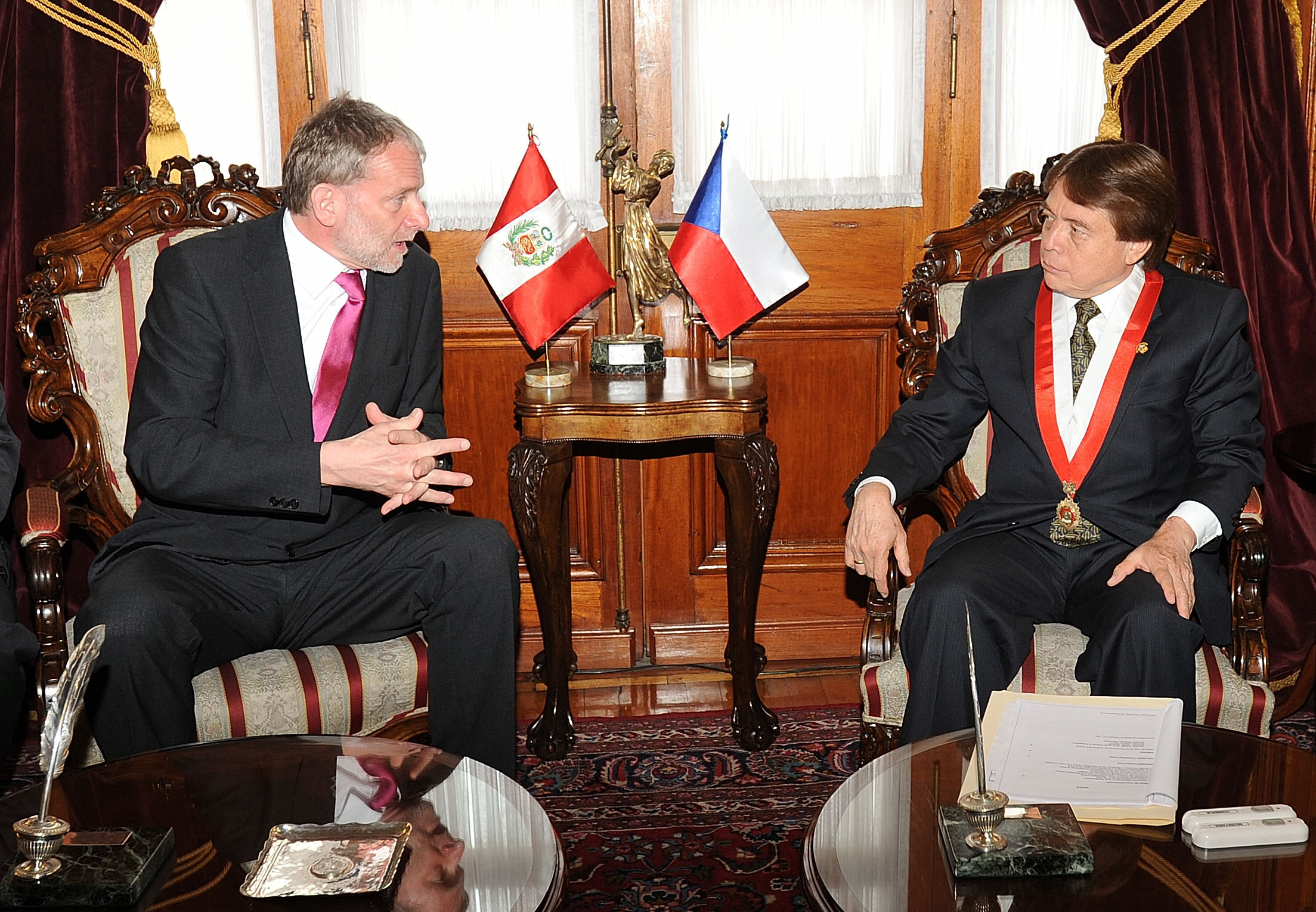 El presidente del Congreso, César Zumaeta Flores, recibió hoy la visita de una delegación de senadores de la República Checa encabezada por Tomás Jirsa. Con ellos estuvo también el embajador checo en el Perú, Vladimir Aingenvruka.